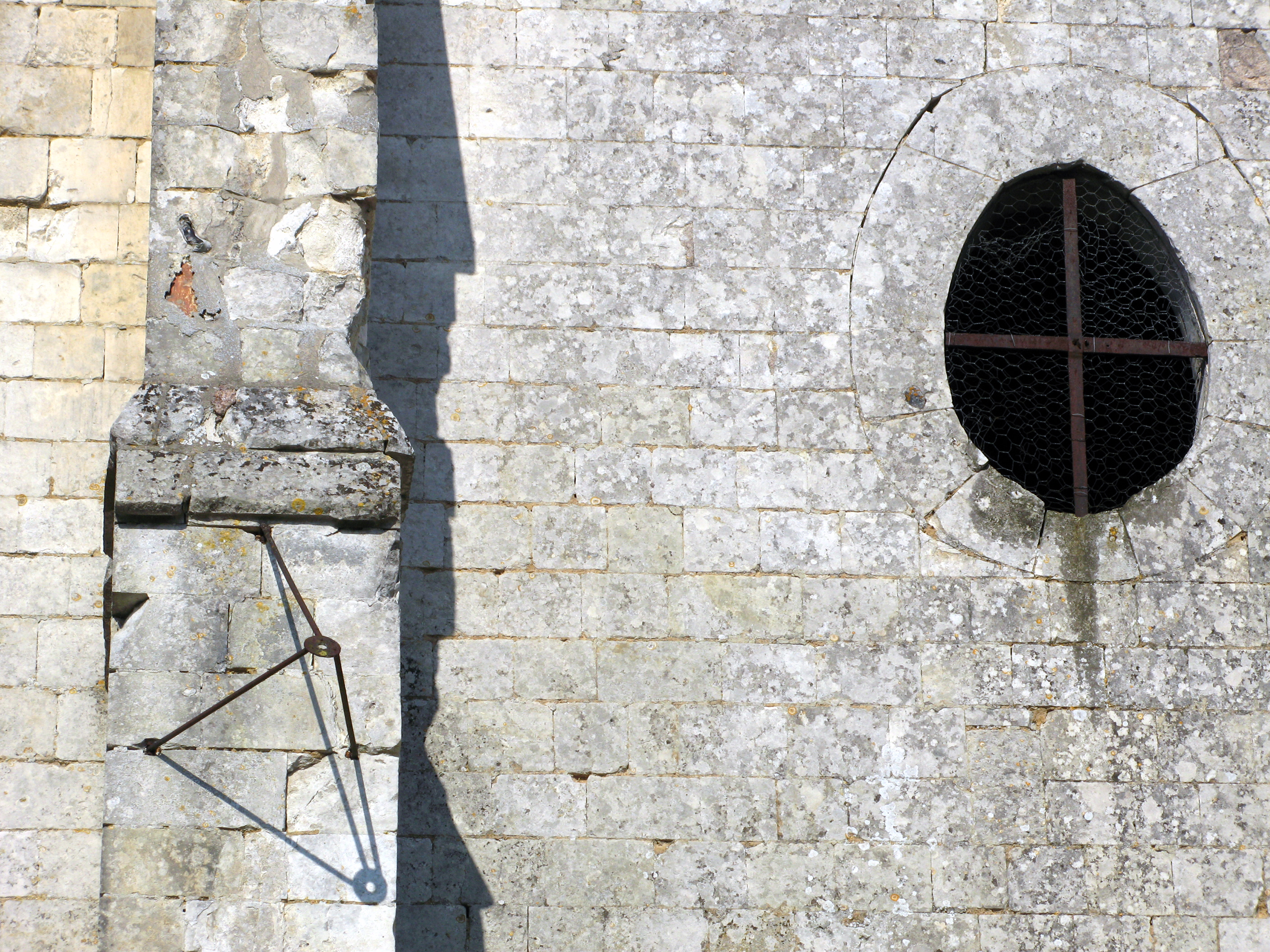 Lignières-Châtelain (Somme, France) - Le cadran solaire de l'église. . .